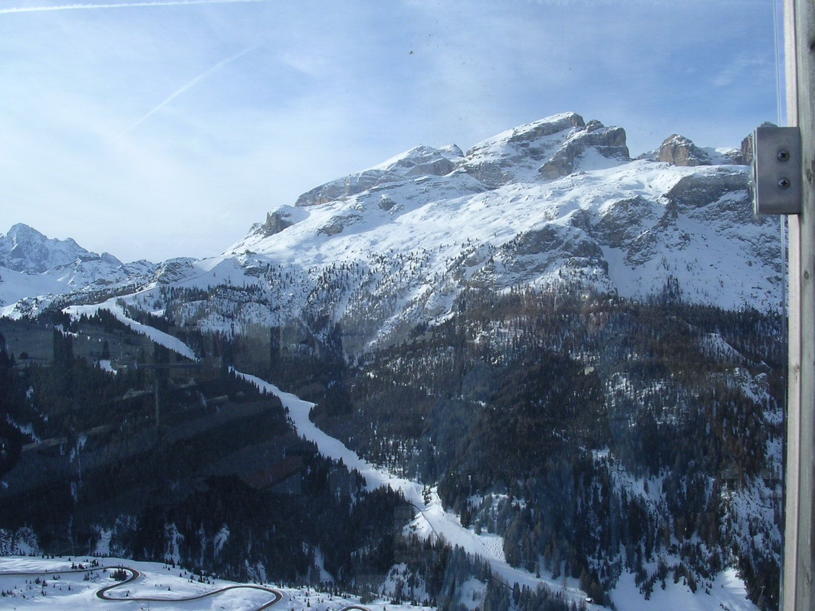 Col Alto 2000 m,Corvara View Boè al Crep de Mont 2198 m -Piste Boè